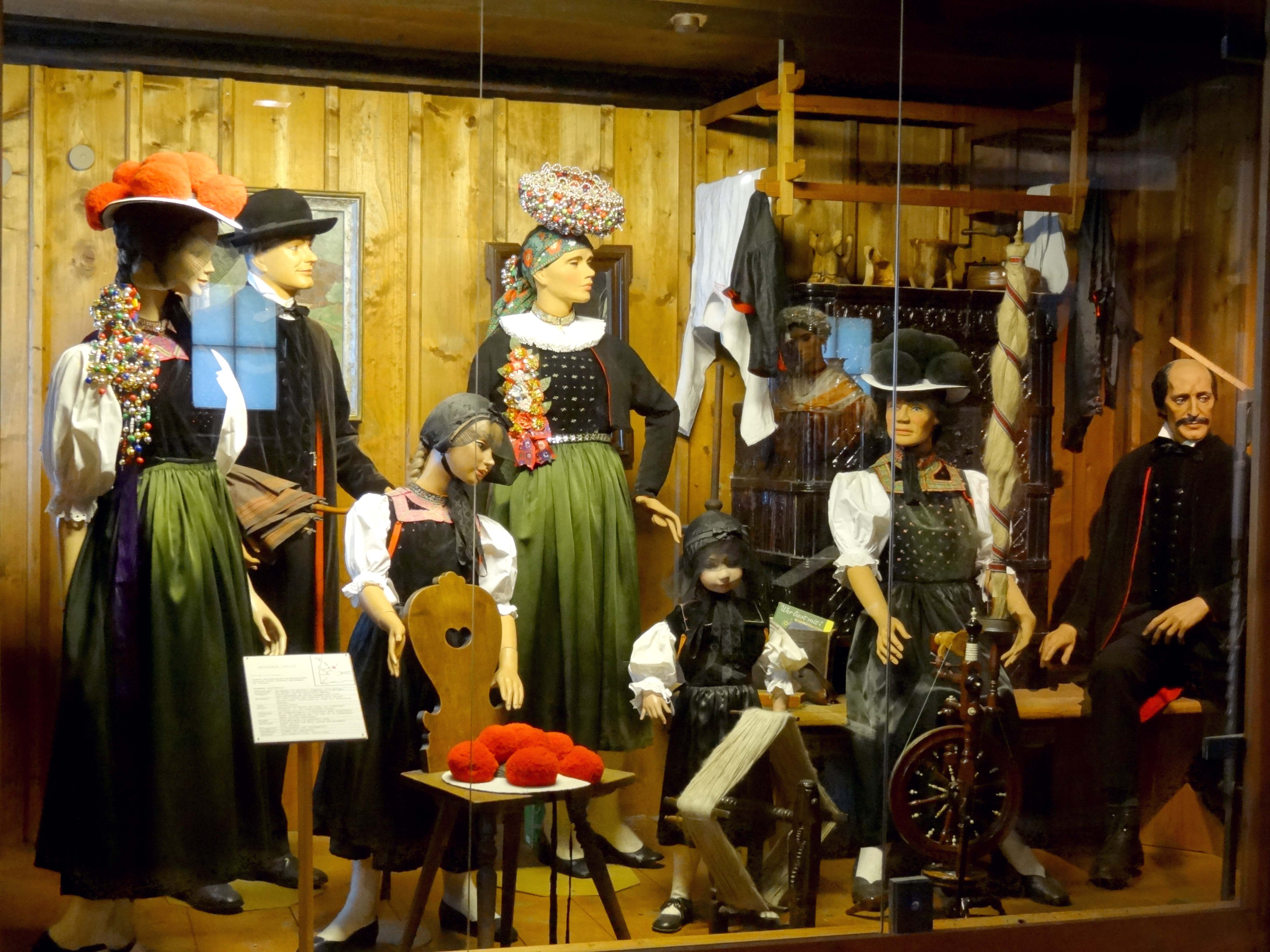 Trachtenmuseum Haslach - siehe Bildtitel.